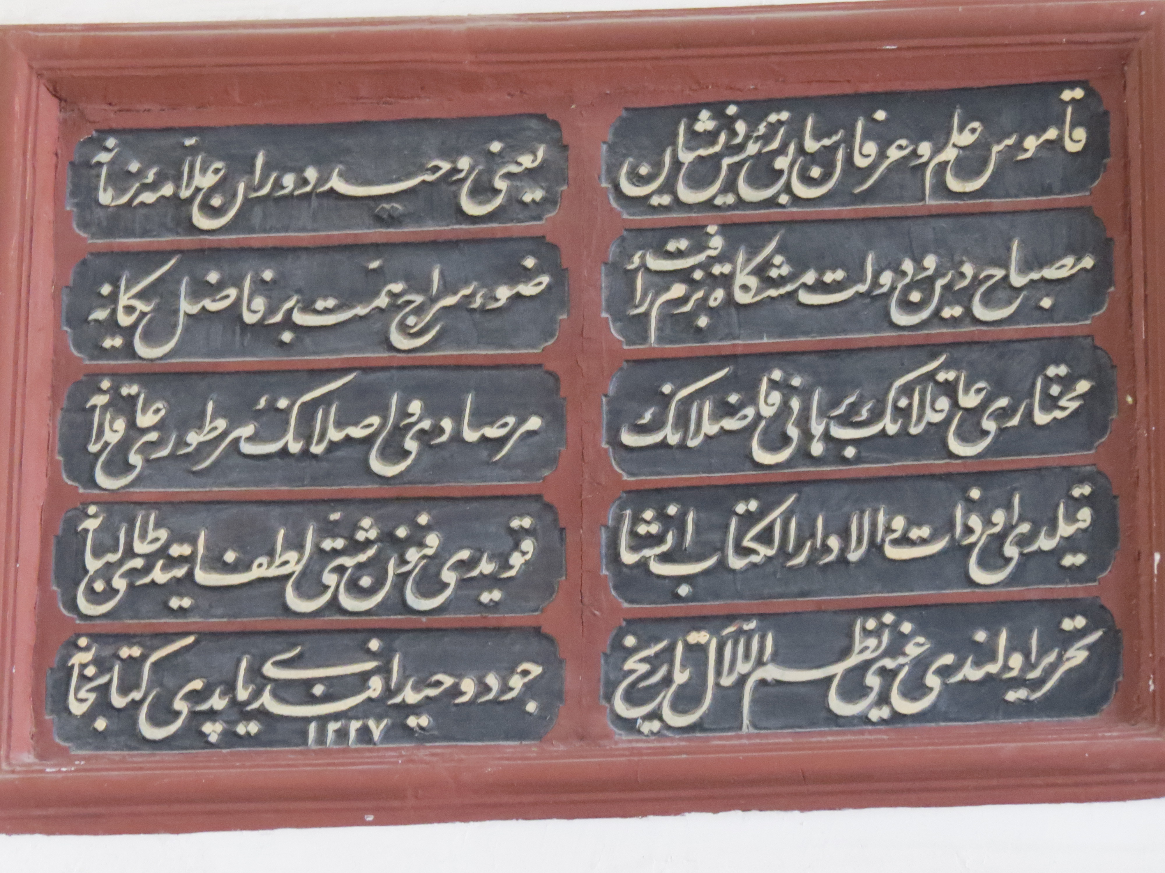 vahid paşa kütüphanesi kitabesi